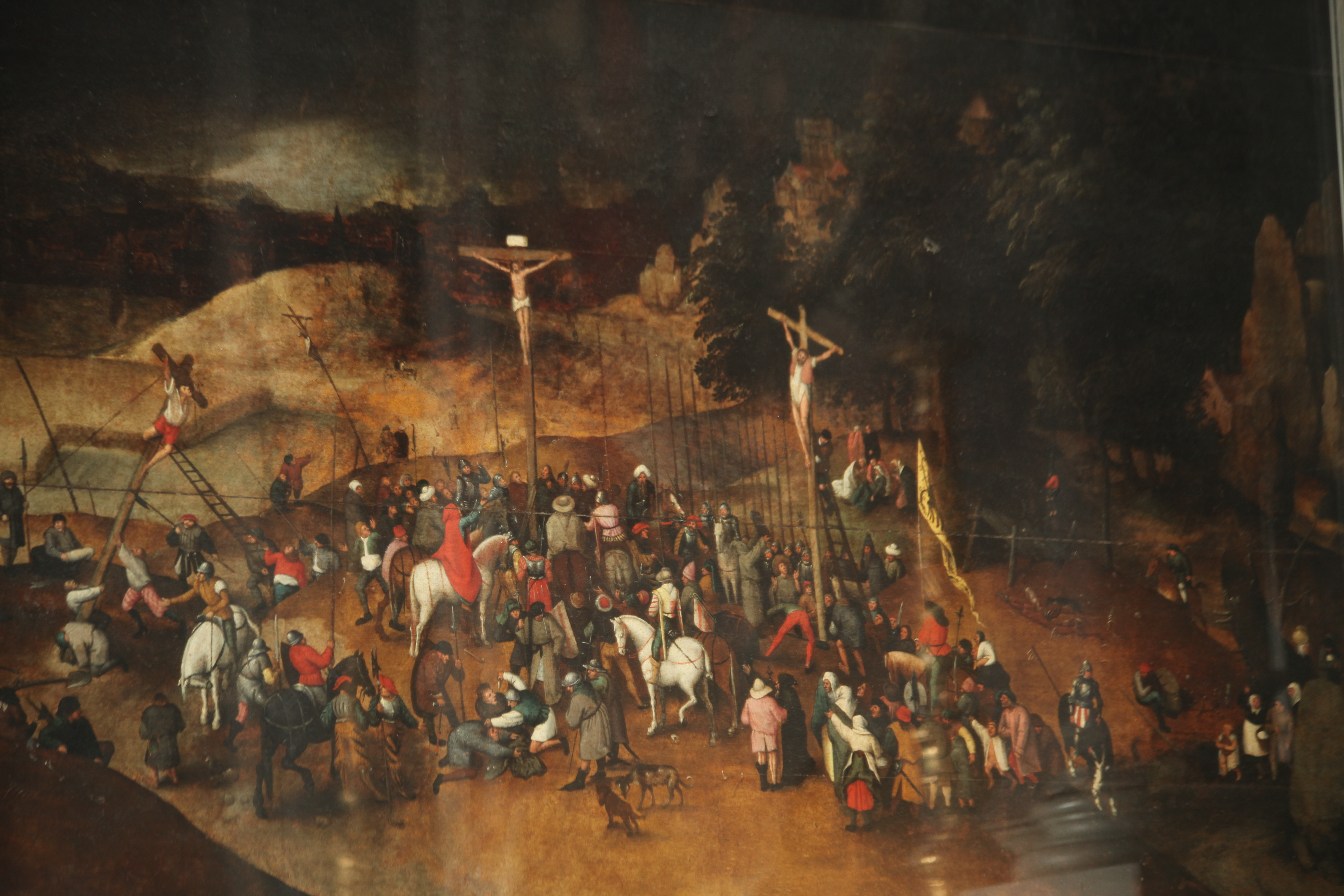 Chiesa di Santa Maria Maddalena This is a photo of a monument which is part of cultural heritage of Italy.